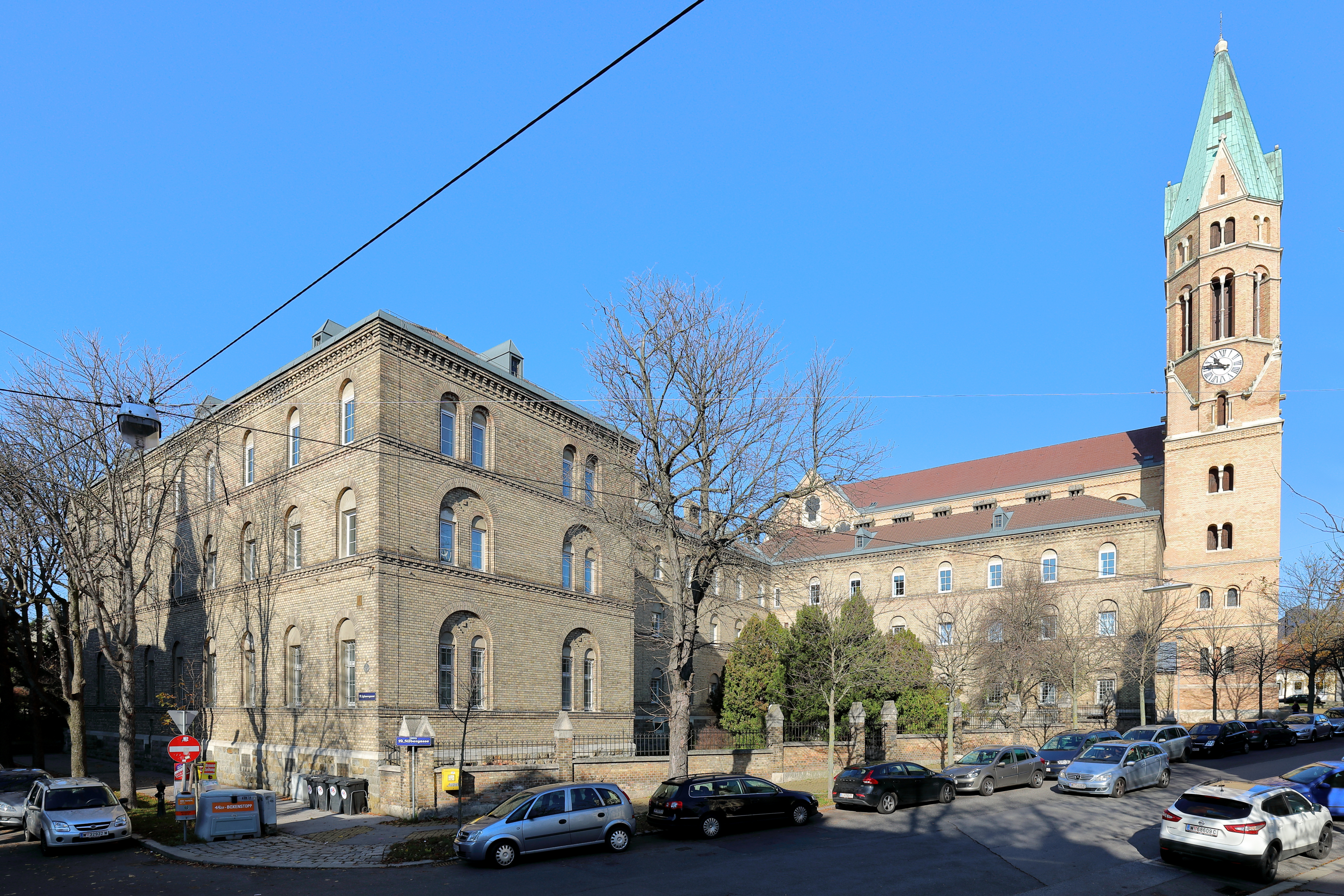 Südostansicht des Karmelitenklosters im 19. Wiener Bezirk Döbling. Das Kloster und die Kirche in Form einer neuromanischen Basilika mit drei Schiffen und einer Doppelturmfassade wurde ab 1898 nach Plänen des Architekten Richard Jordan errichtet.